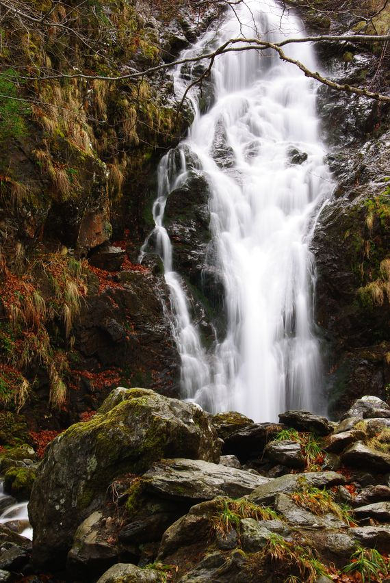 Une belle cascade située à quelques pas de la piste conduisant au port de Salau.